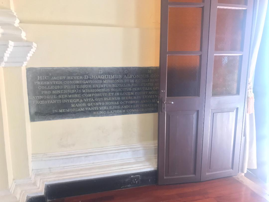 聖若瑟修院聖堂內的江沙維神父遺骸